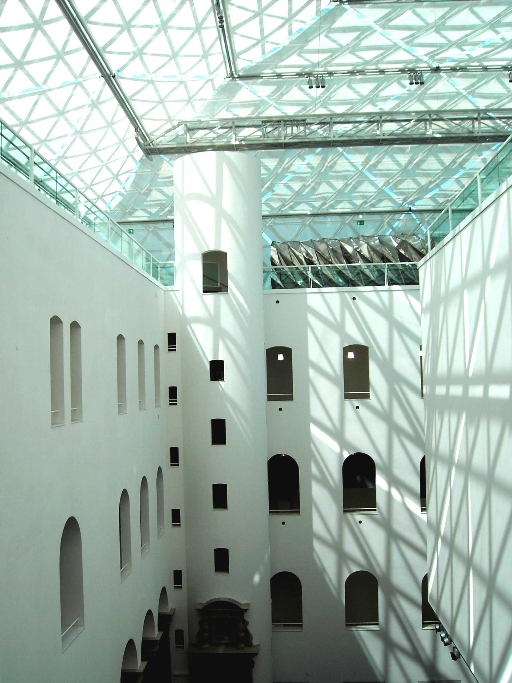 Ständehaus Düsseldorf, innen